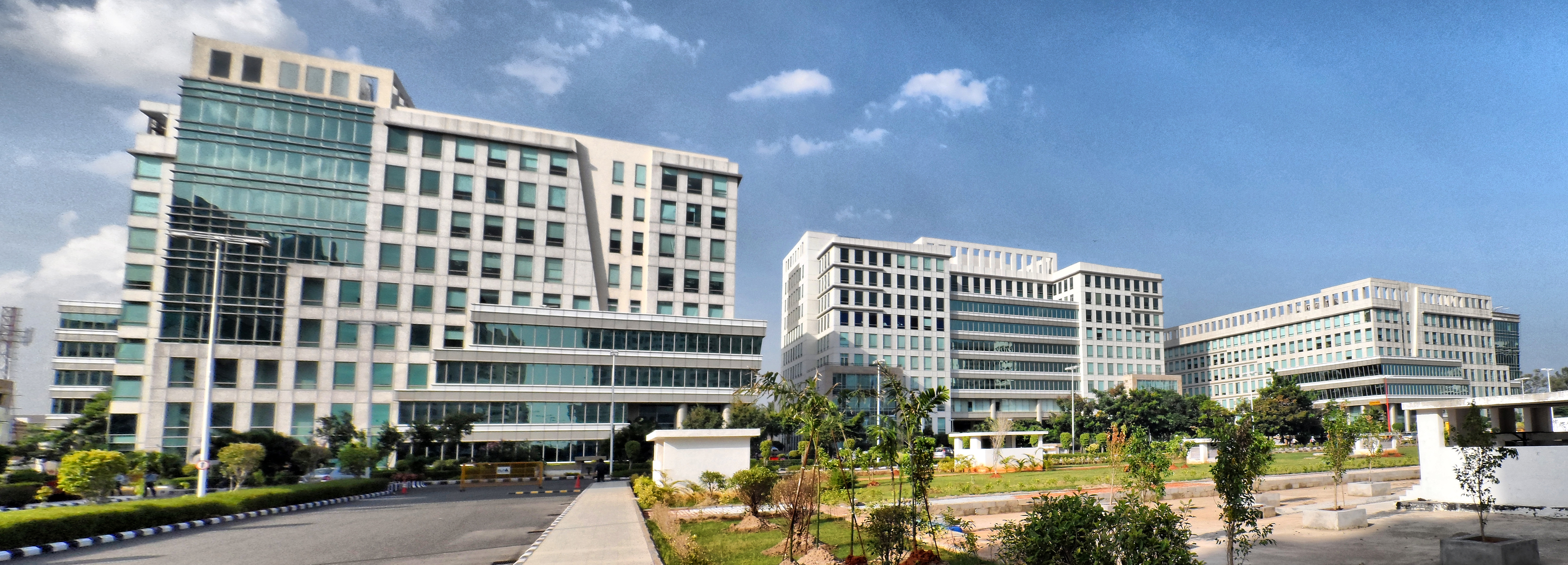 DLF IT Park, Ramapuram, Chennai